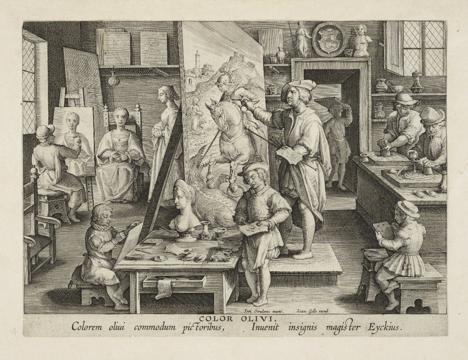 Nova Reperta 14 : La peinture à l'huile : l'atelier de Jan van Eyck, gravé par Théodore Galle et éditée par Philippe Galle.